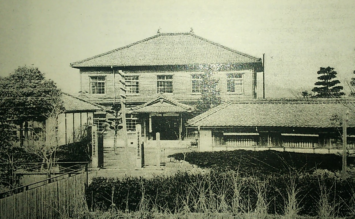 京都府与謝郡宮津町（現・宮津市）にあった宮津尋常高等小学校。大正時代。